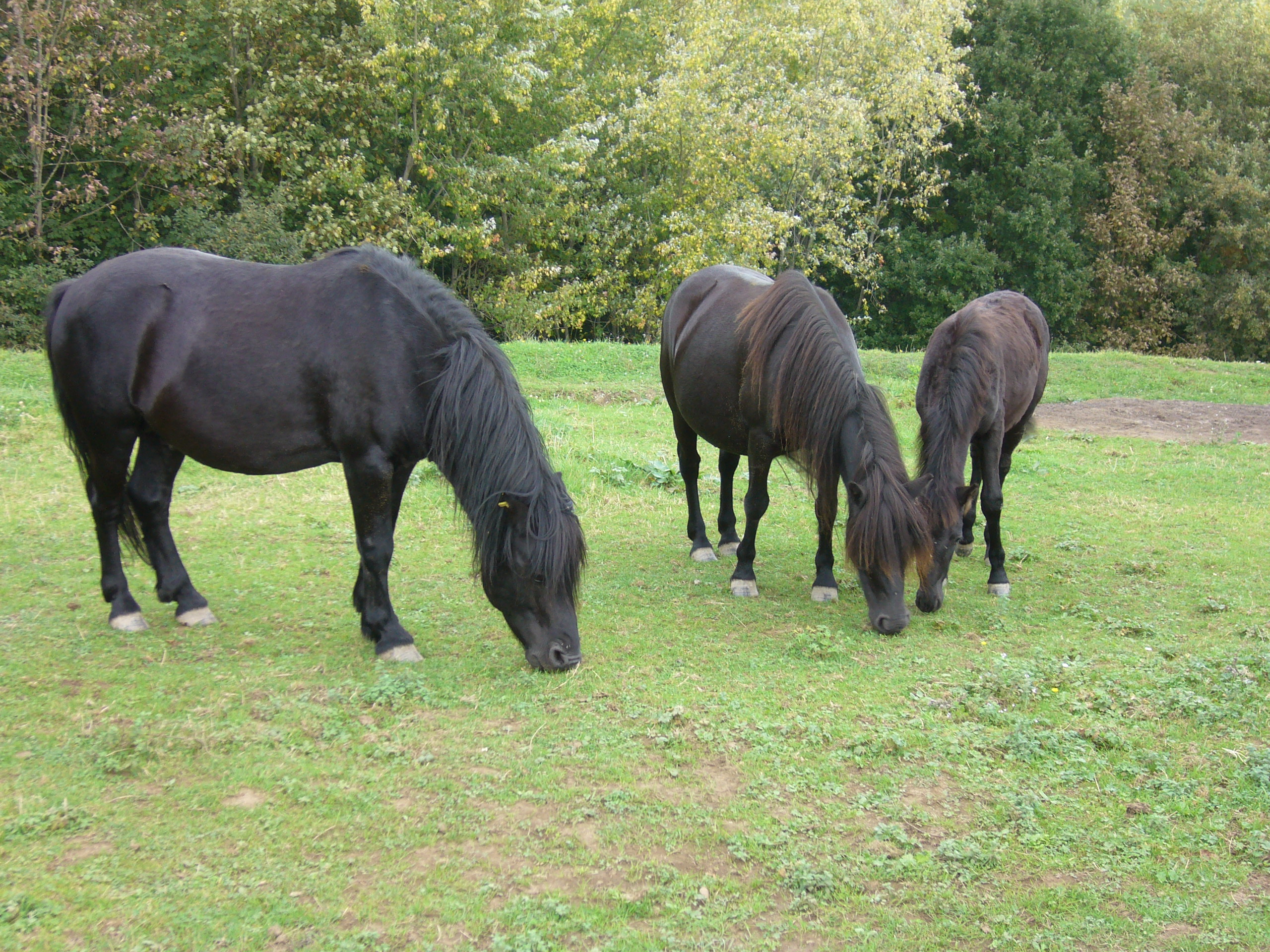 Pottokak. Zaldia, behor eta moxal.